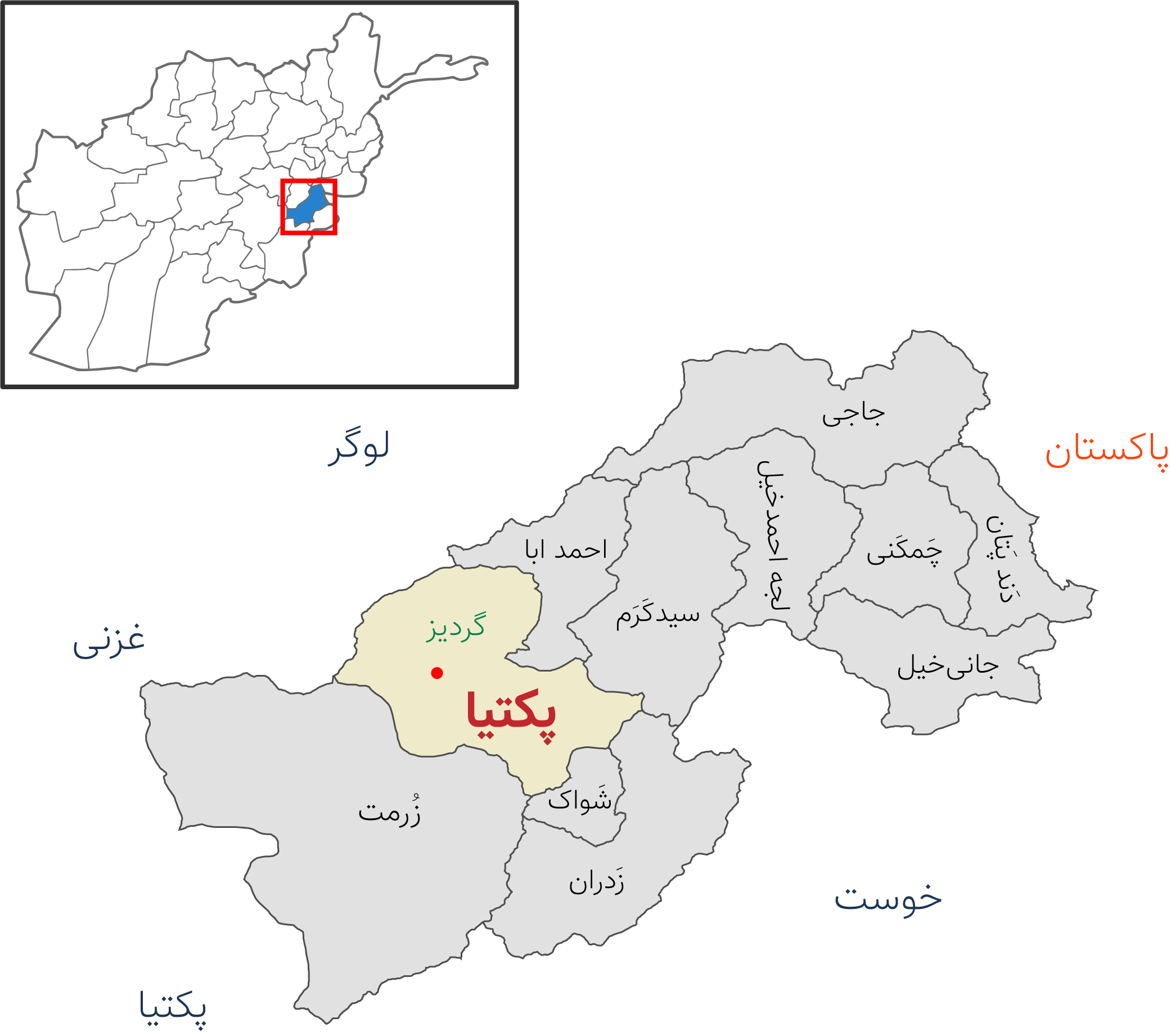 نقشه ولایت پکتیا